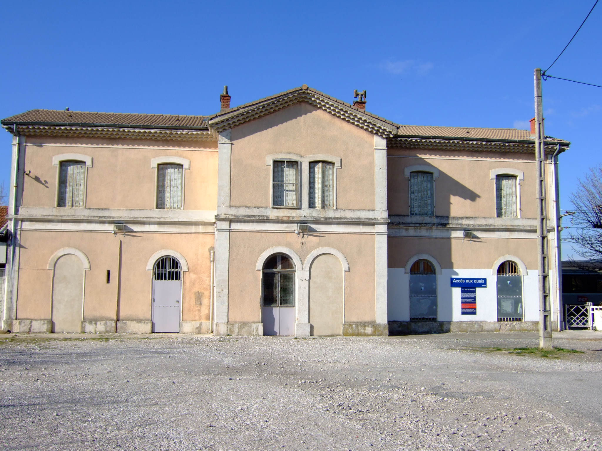 La gare de Donzère, département de la Drôme, France.